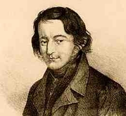 Friedrich Ludwig Weidig (1797-1837), protestantischer Theologe und Pädagoge aus dem Elsass